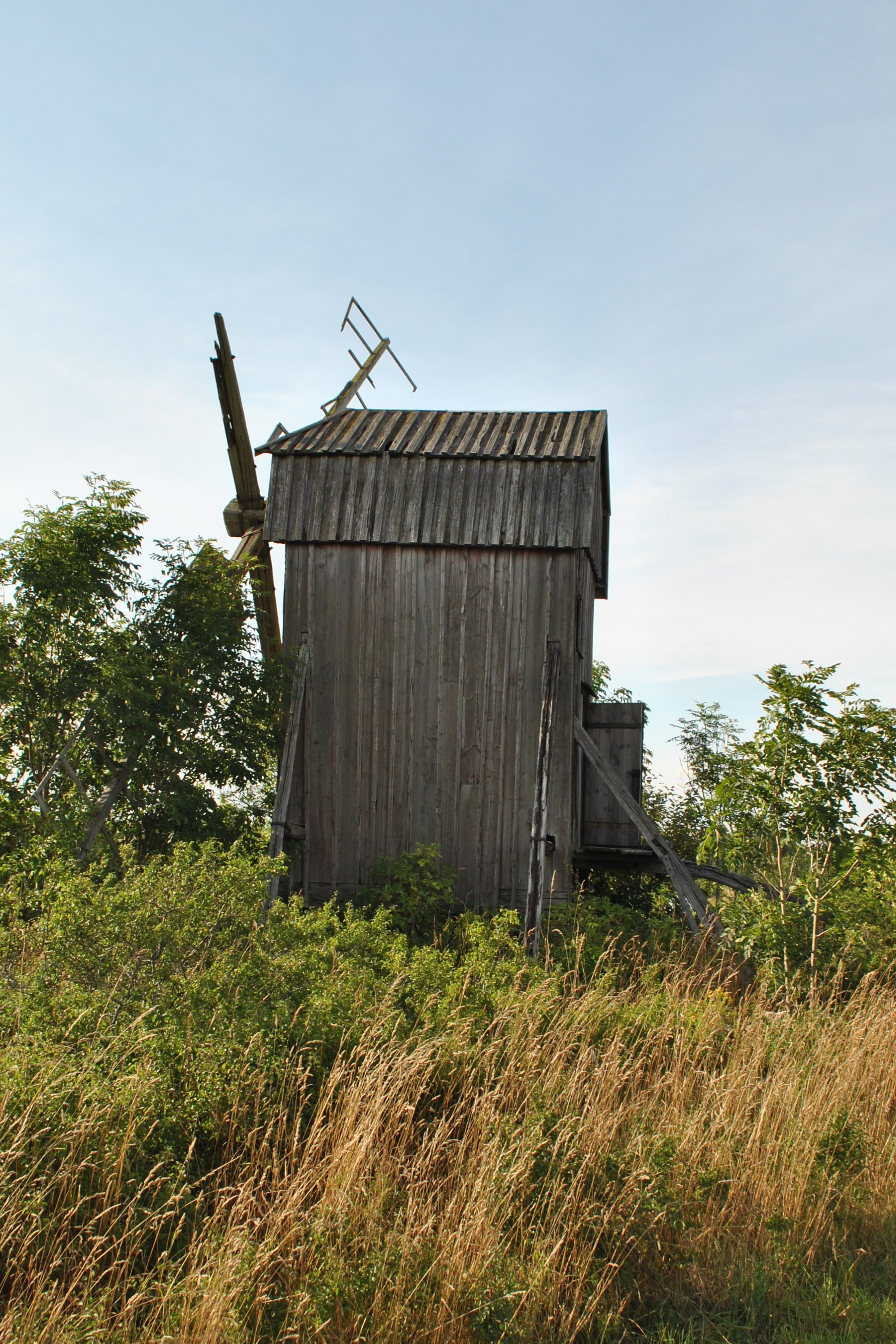 Stubbkvarn i Mörby, Löts sn, Öland